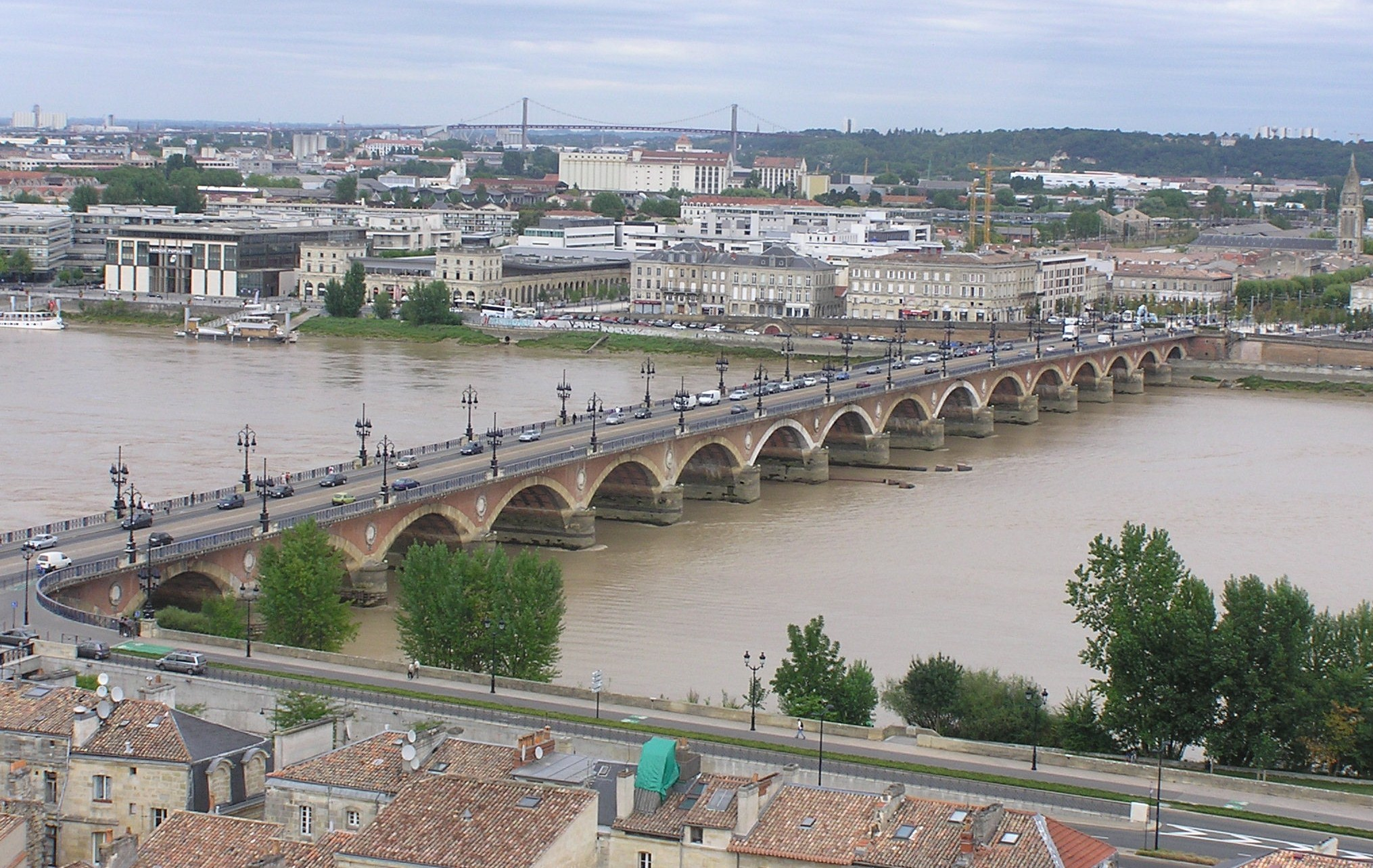 Bordeaux : Pont de Pierre vu depuis la flèche Saint Michel